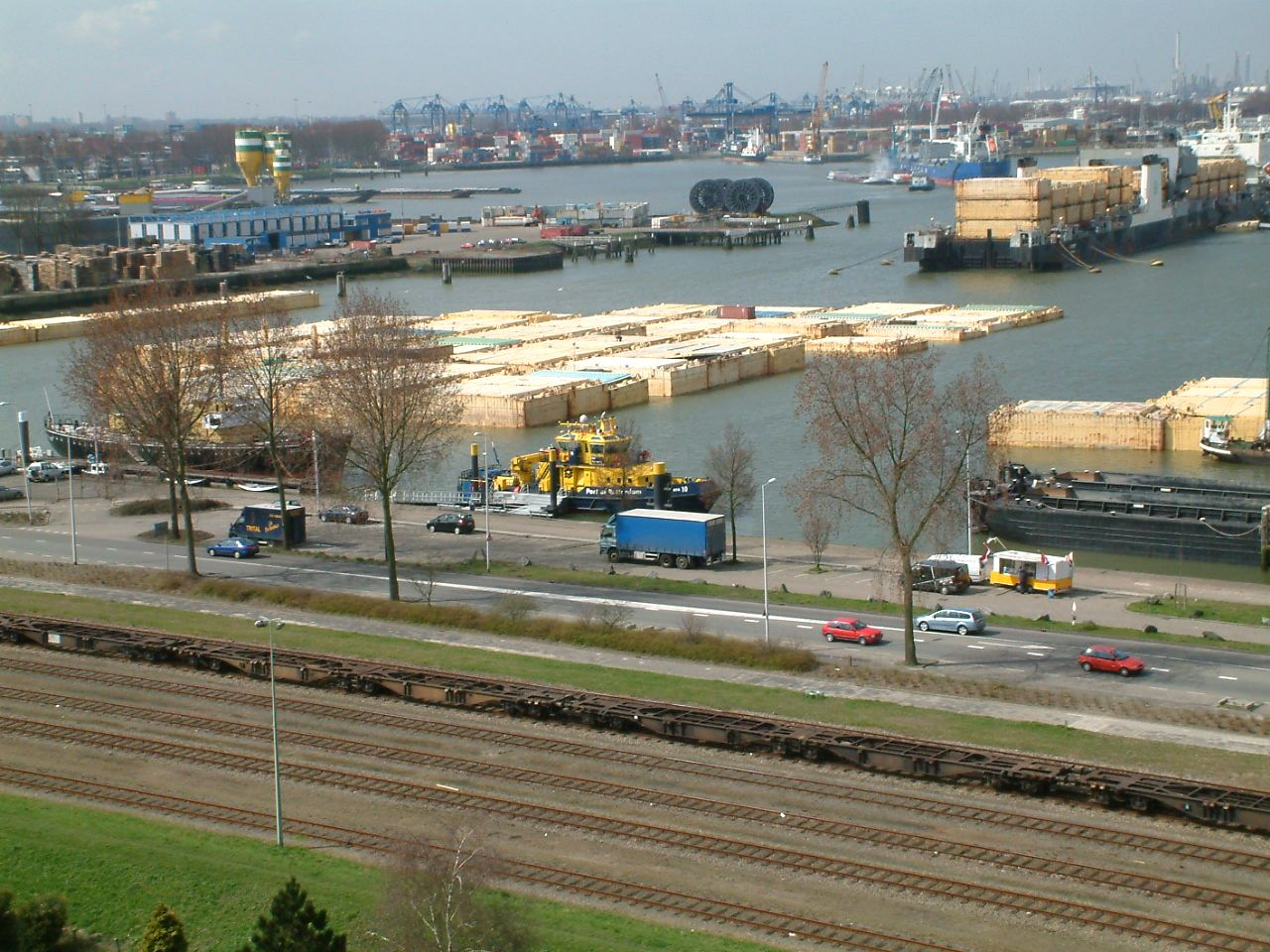 De RPA 10 voor de wal in de Waalhaven Rotterdam (vanaf de 12e vloer van Waelestein).